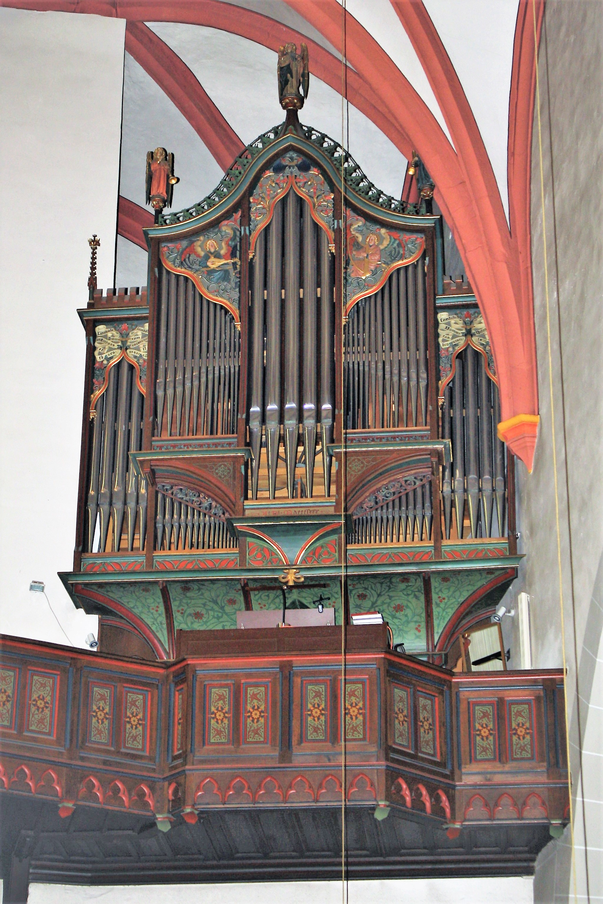 Ehem. Ratzmannorgel von 1880, umfassend renoviert bzw. neu gebaut und erweitert 1984 durch die Orgelbaufirma Krämer und Fischer, unter Beibehaltung des Gehäuses und fast aller Register.